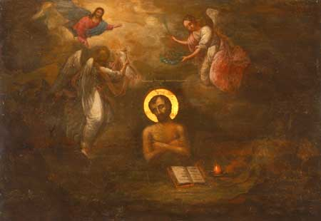 Saint John the Suffering, monk of Kyiv caves monastery (d. 1160), Ukraine. Йоан Багатостраждальний (? - 1160 р.) — древньруський святий, чернець Печерського монастиря. Преподобний. Пам'ять 11 жовтня і 31 липня. Борючись з спокусами свого тіла, суворо подвизався: не спав ночами, їжу приймав один раз на 2-3 дні, а іноді раз на тиждень. Зрештою Іоанн зачинився в Антонієвій печері. У цей час він посилив свої подвиги: носив на тілі важкі залізні вериги, на час Великого посту заривав себе по пояс у землю. І тільки після майже тридцяти років подвижництва Іоанн позбувся своїх тілесних пристрастей. Його мощі спочивають у Ближніх печерах.